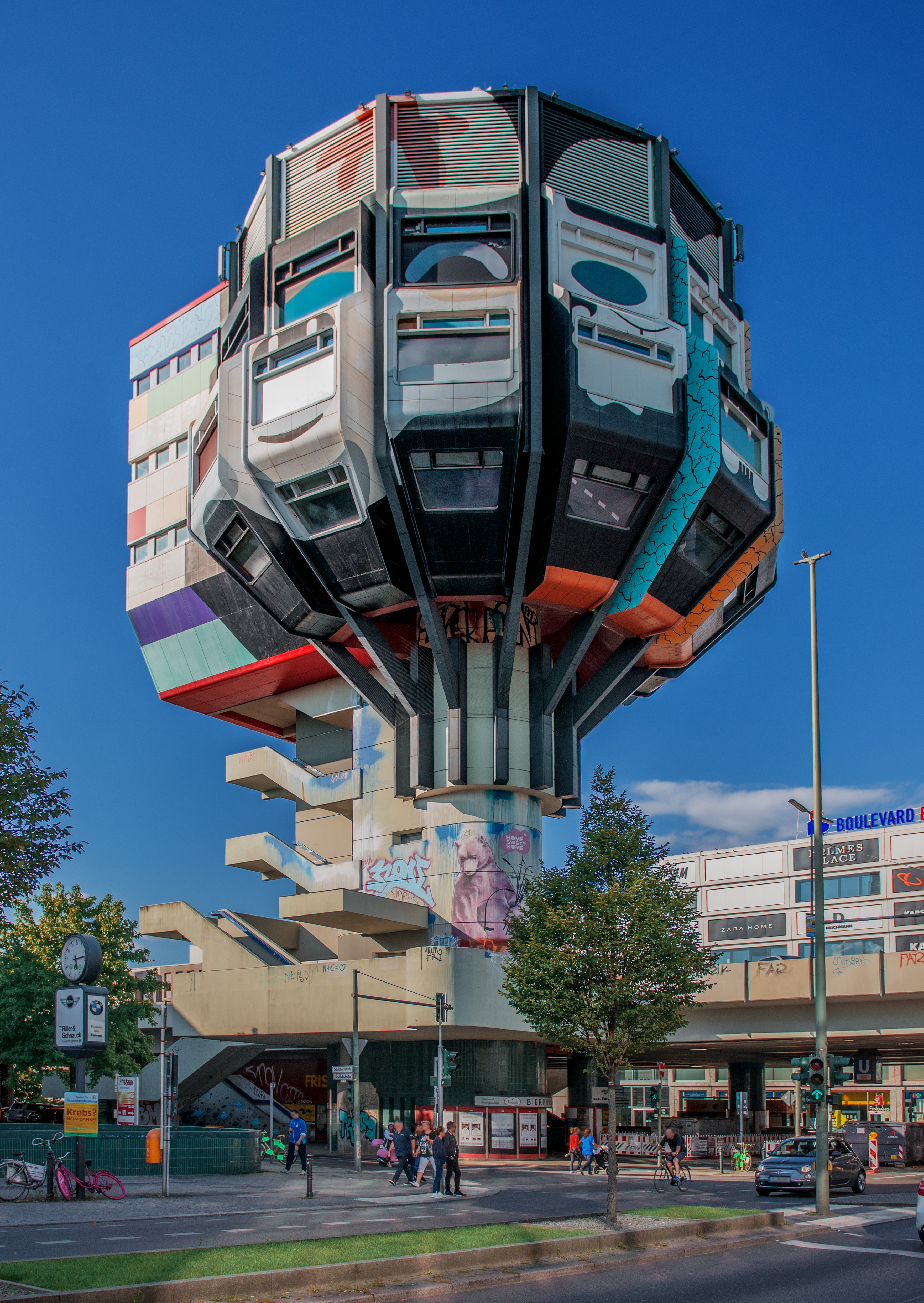 Bierpinsel in Berlin-Steglitz, 1972-1976 nach Entwürfen der Architekten Ralf Schüler und Ursulina Schüler-Witte erbaut